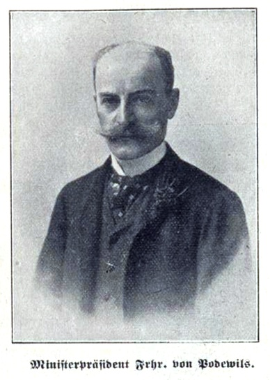 Clemens von Podewils-Dürniz (1850-1922), bayerischer Außen- und Kultusminister